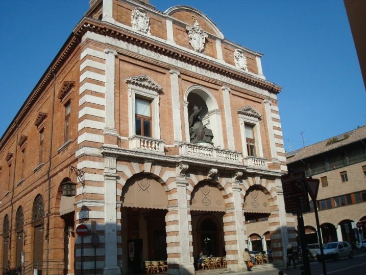 Palazzo del Ridotto à Cesena (Italie)